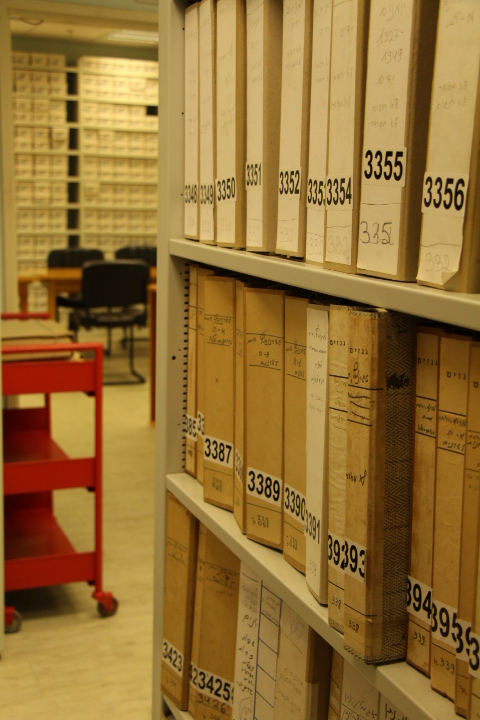 חלל האכסון בגנזים